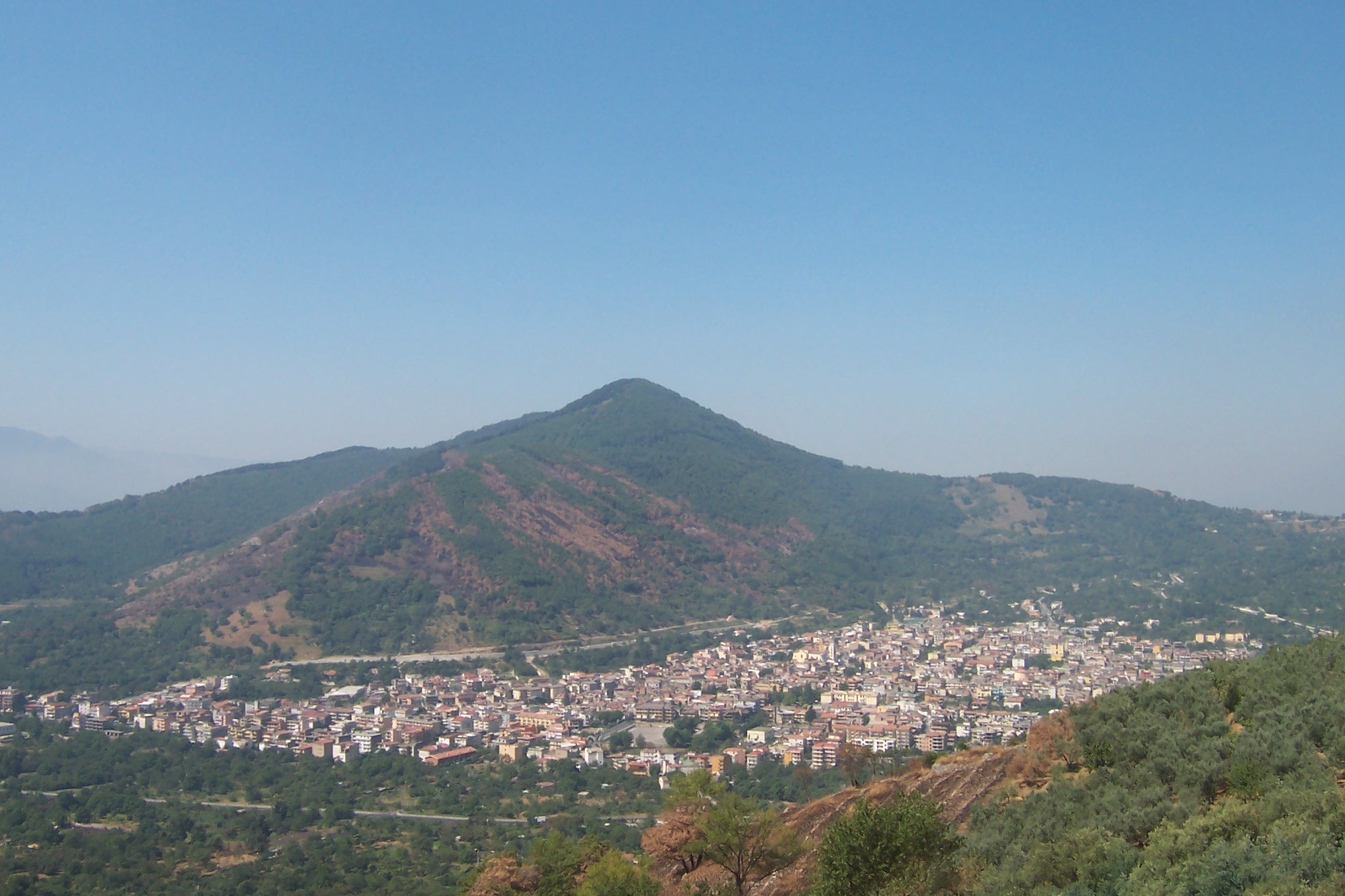 Siano, vista dalla sella della Madonna del Carmine di Bracigliano